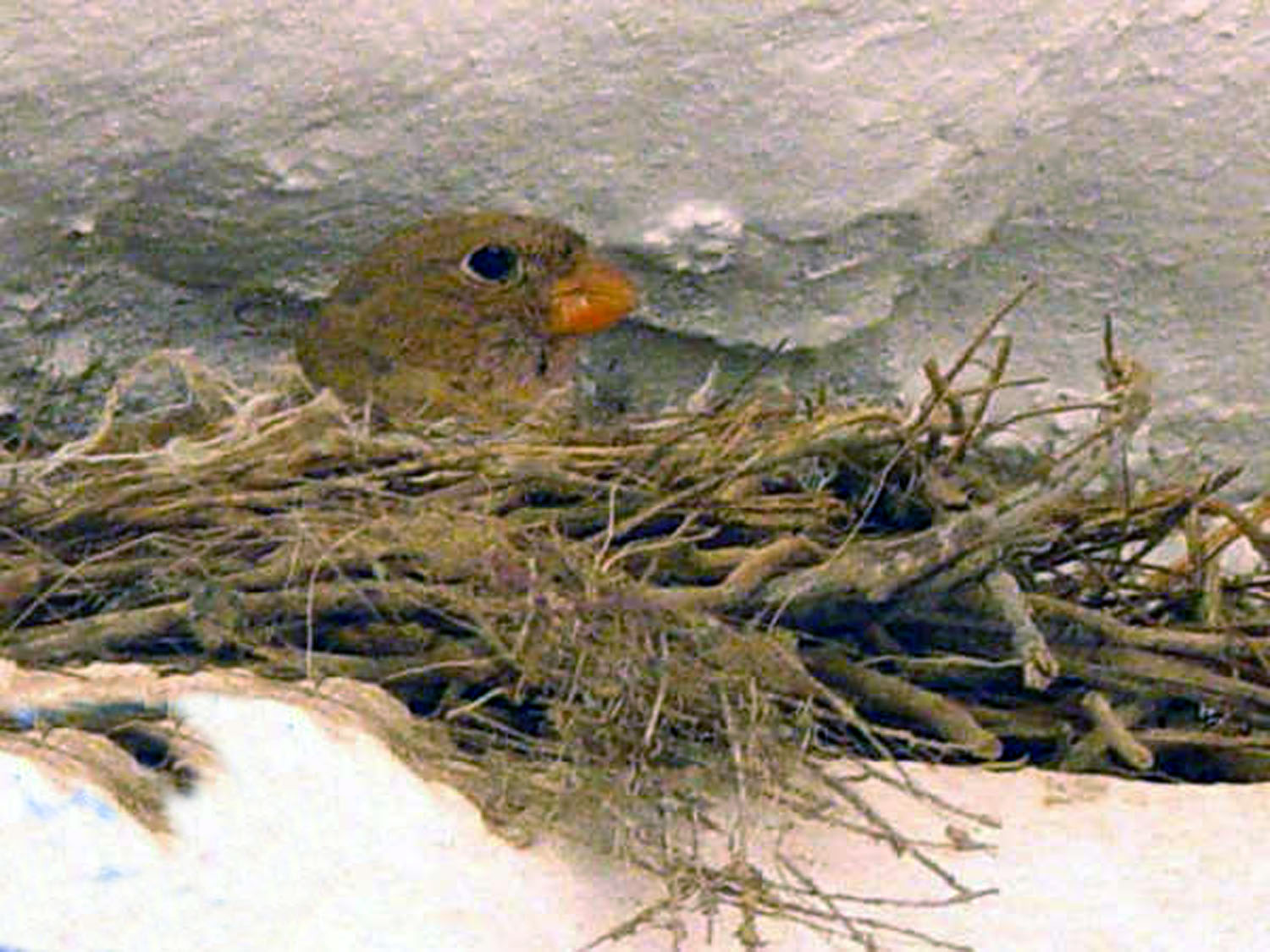 Fotografía tomada en la ciudad vieja de Ghadames el mes de abril de 2006 durante el viaje organizado por la Sociedad Catalana de Geografía a Libia. El camachuelo permanecía inmutable sobre el nido a un par de metros de altura a la entrada de un callejón, junto a una plaza repleta de turistas. Binomial name: Bucanetes githagineus Syn. Rhodopechys githaginea, Rhodopechys githagineus